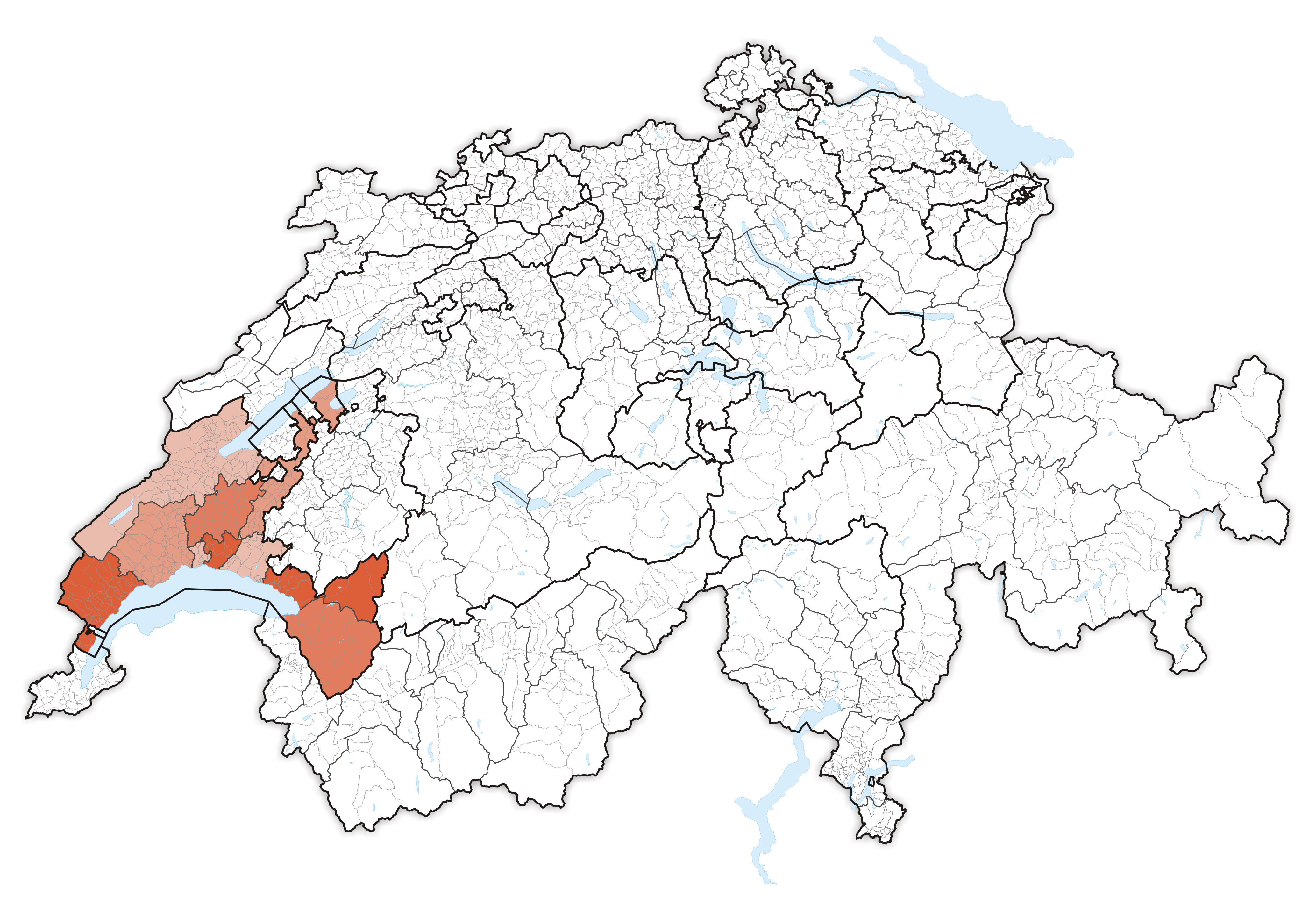 Canton Waadt